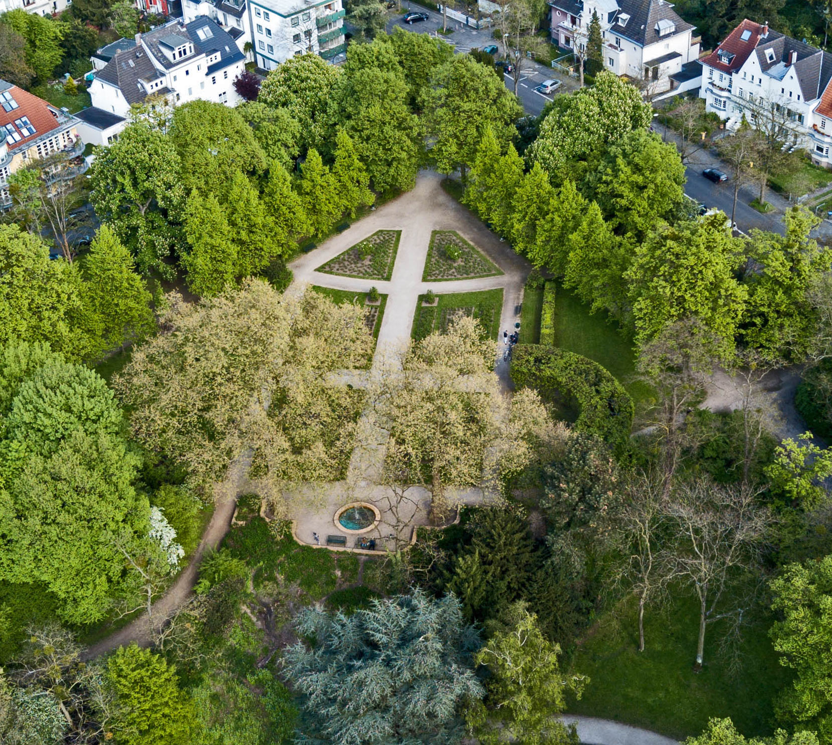 Der im Südwesten im Stadtteil Klettenberg gelegene Park im Frühling 2017. Aufgenommen mit einer Drohne. Oben rechts die Siebengebirgsallee, links die Nassestraße; der See befindet sich in der Verlängerung des Bilds nach unten.